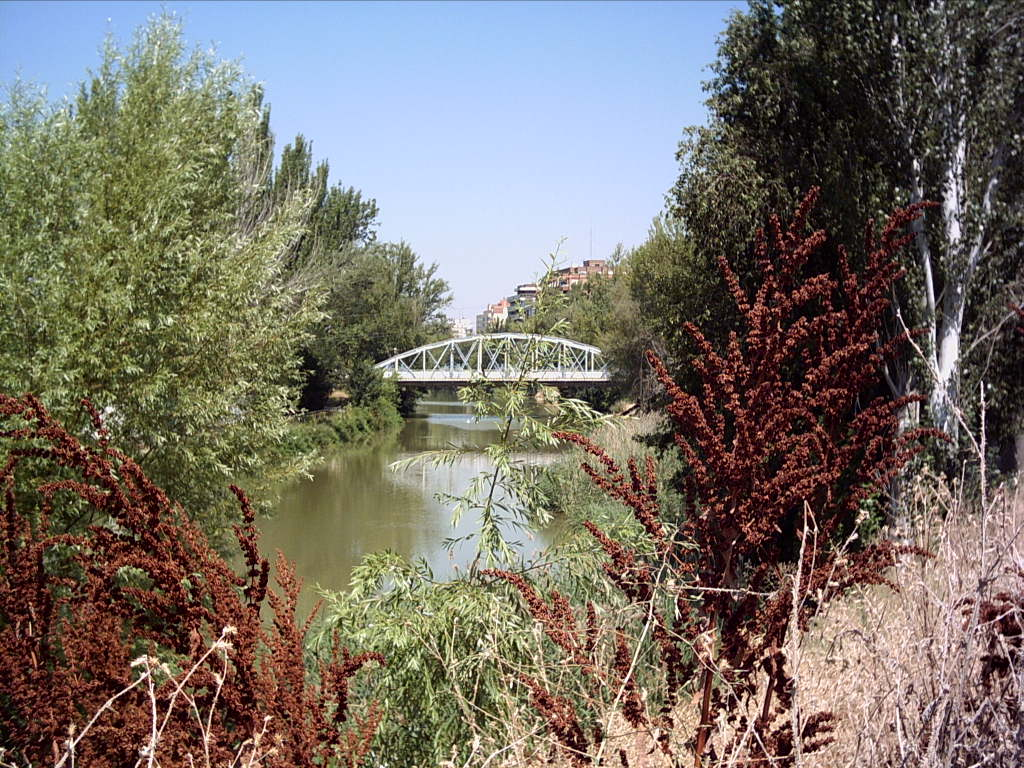 Puente de Hierro, en Palencia.